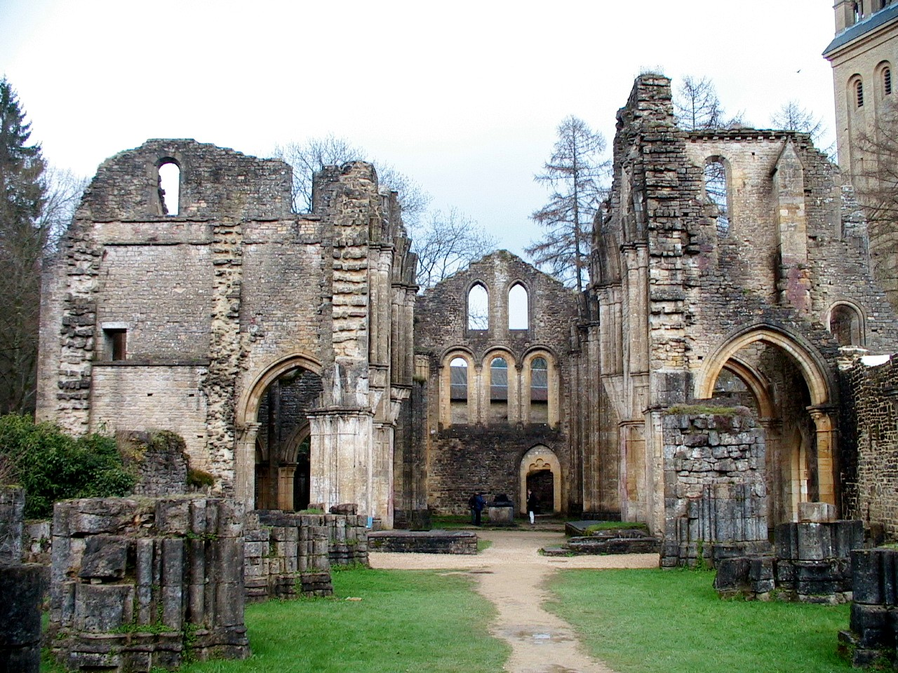 Les ruines de l'ancienne abbaye d'Orval (Belgique)